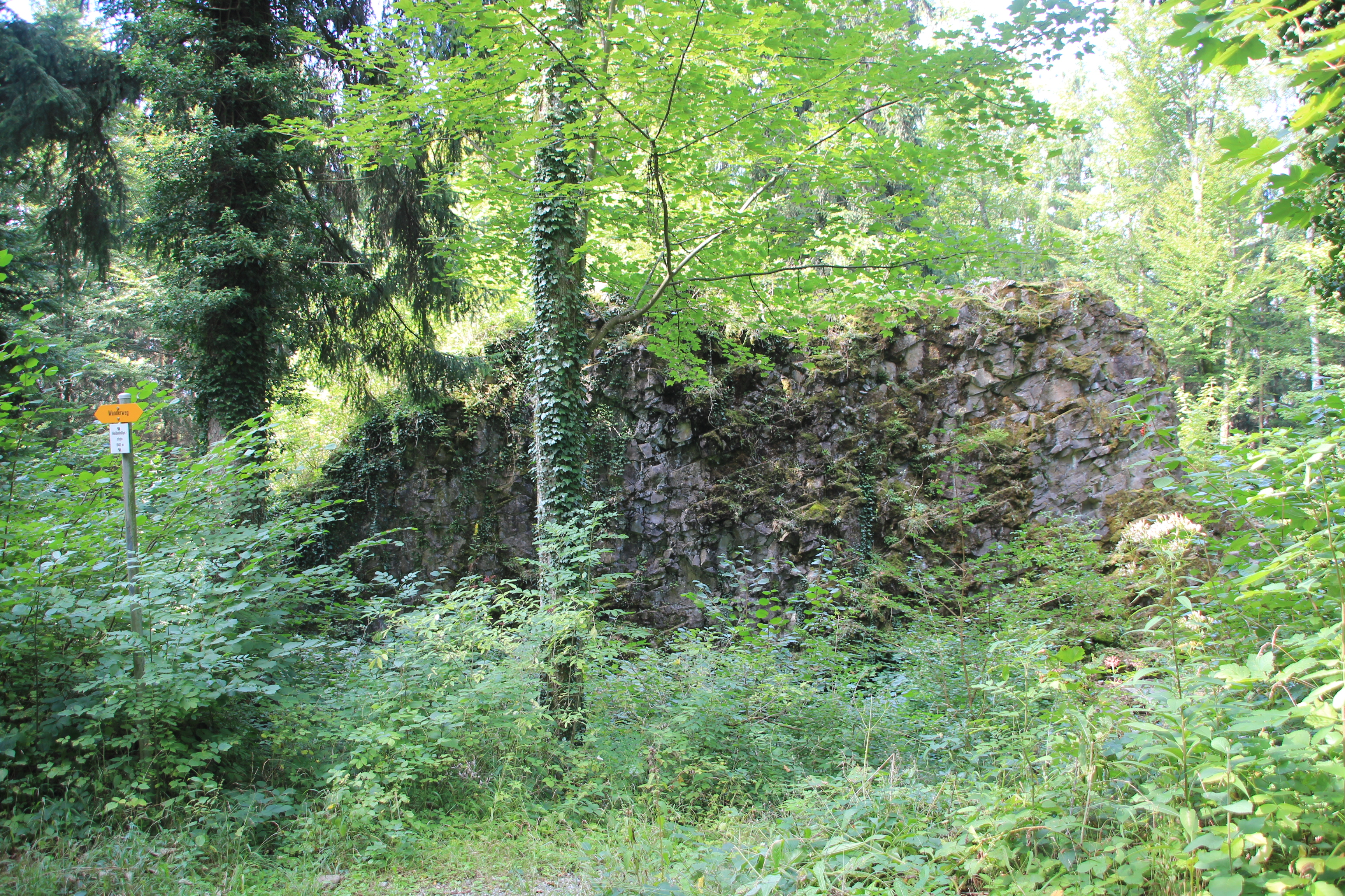 Heidenhübelstein Ansicht vom Wanderweg aus